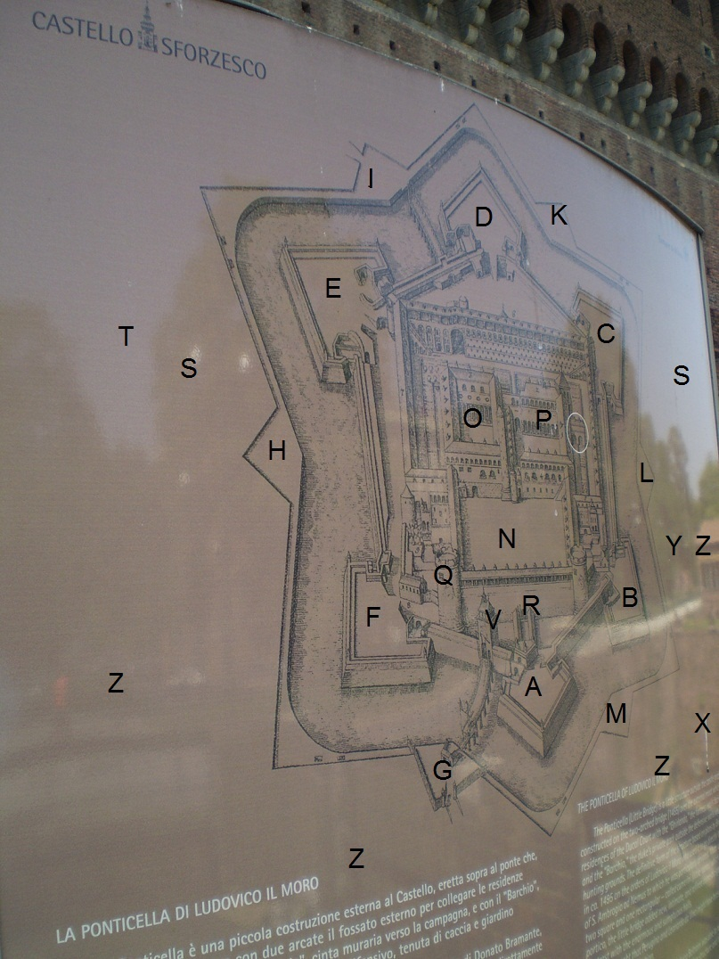 Castillo de los Sforza, en tiempos de Ludovico "el moro". Foto 2007